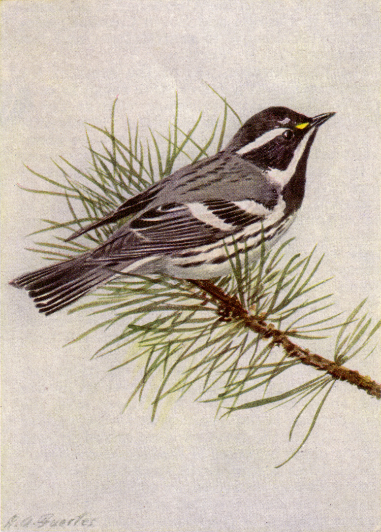 BLACK-THROATED GRAY WARBLER.